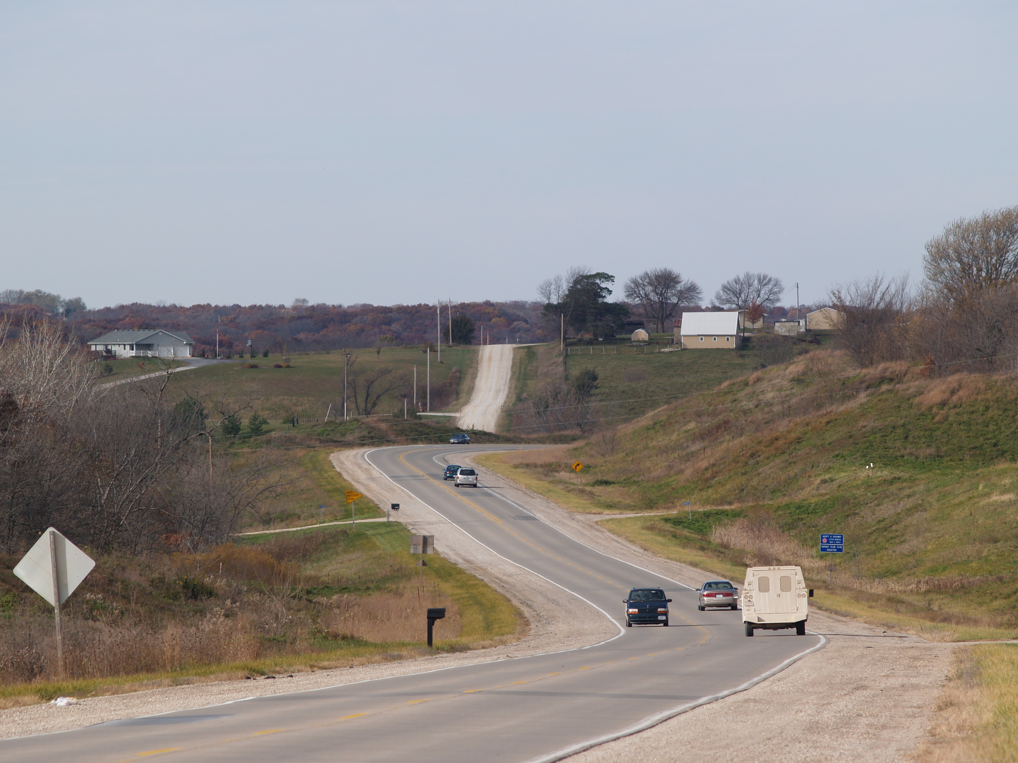 pa302150